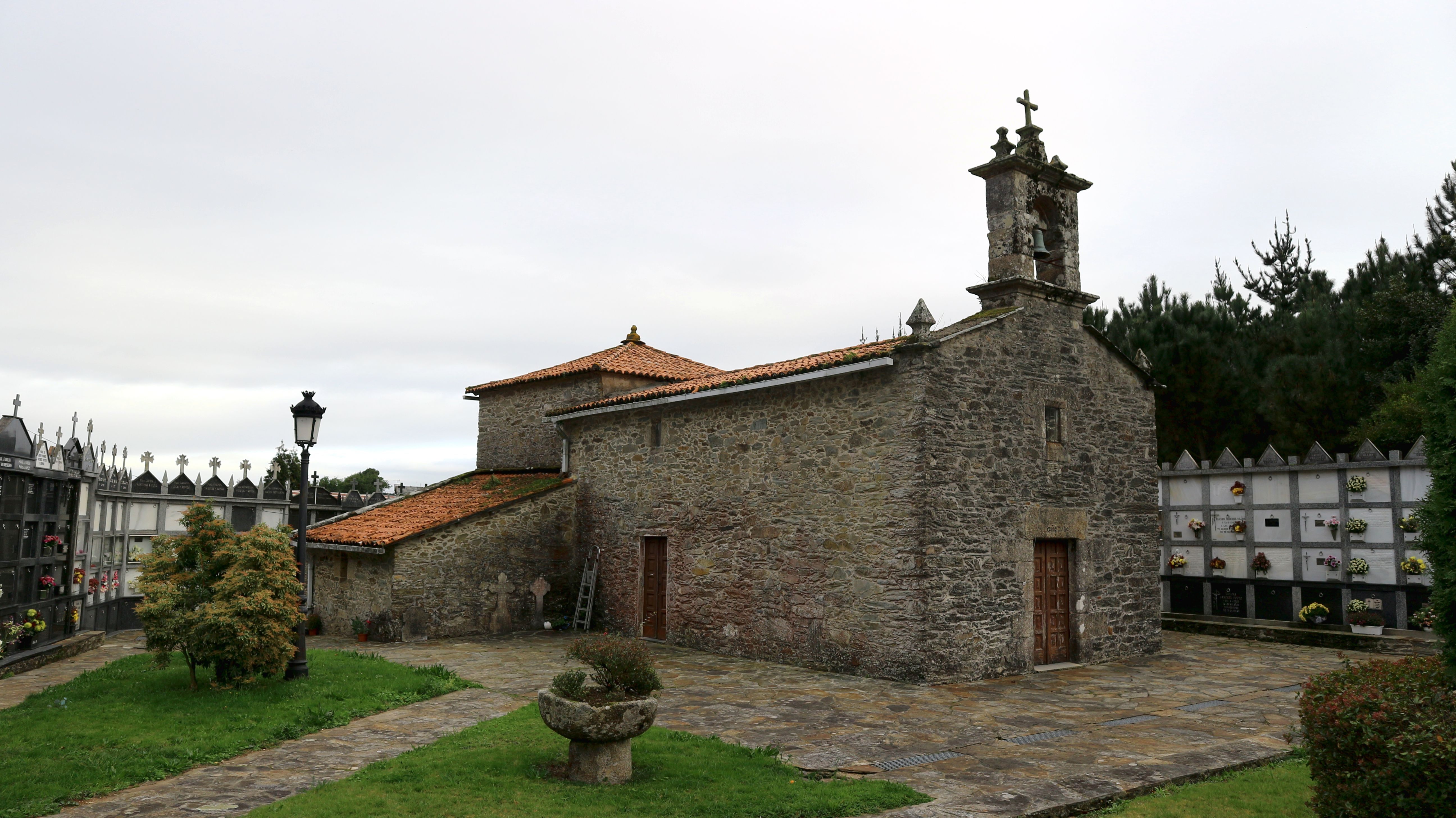 Igrexa de San Pedro de Vizoño. En Vizoño, Abegondo.